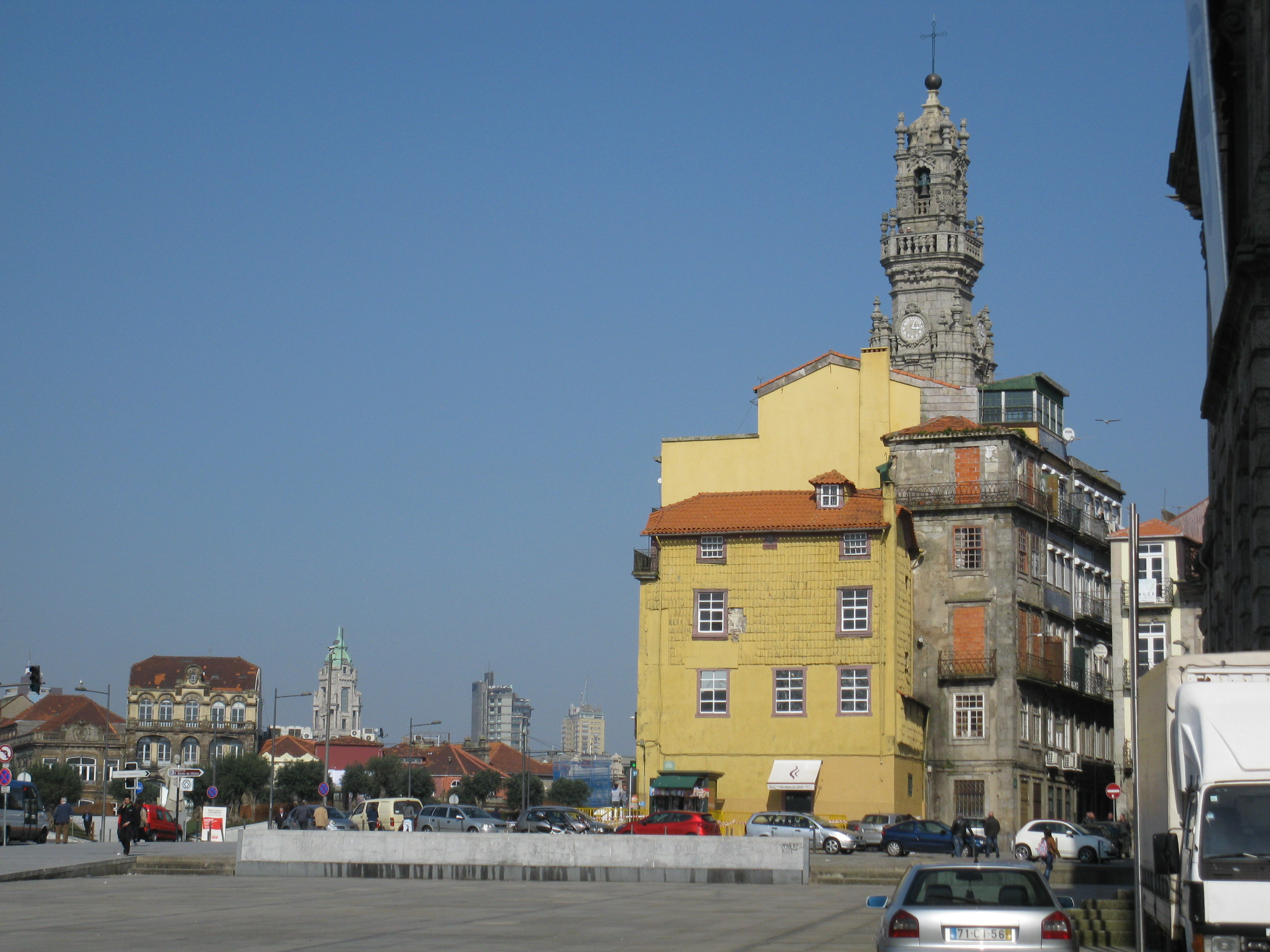 Portugal